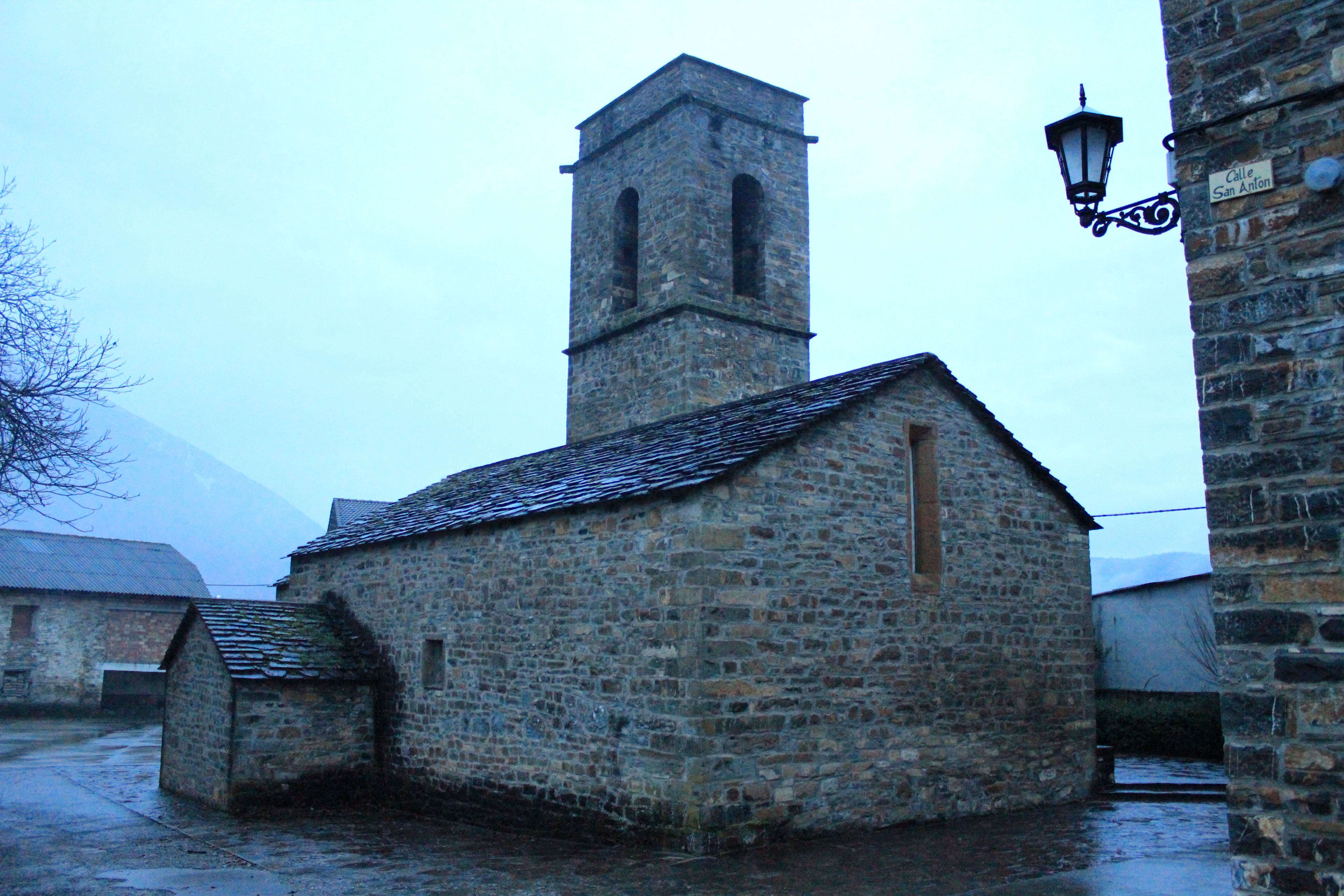 Aragonés: A ilesia de Sant Per (A Fueva).